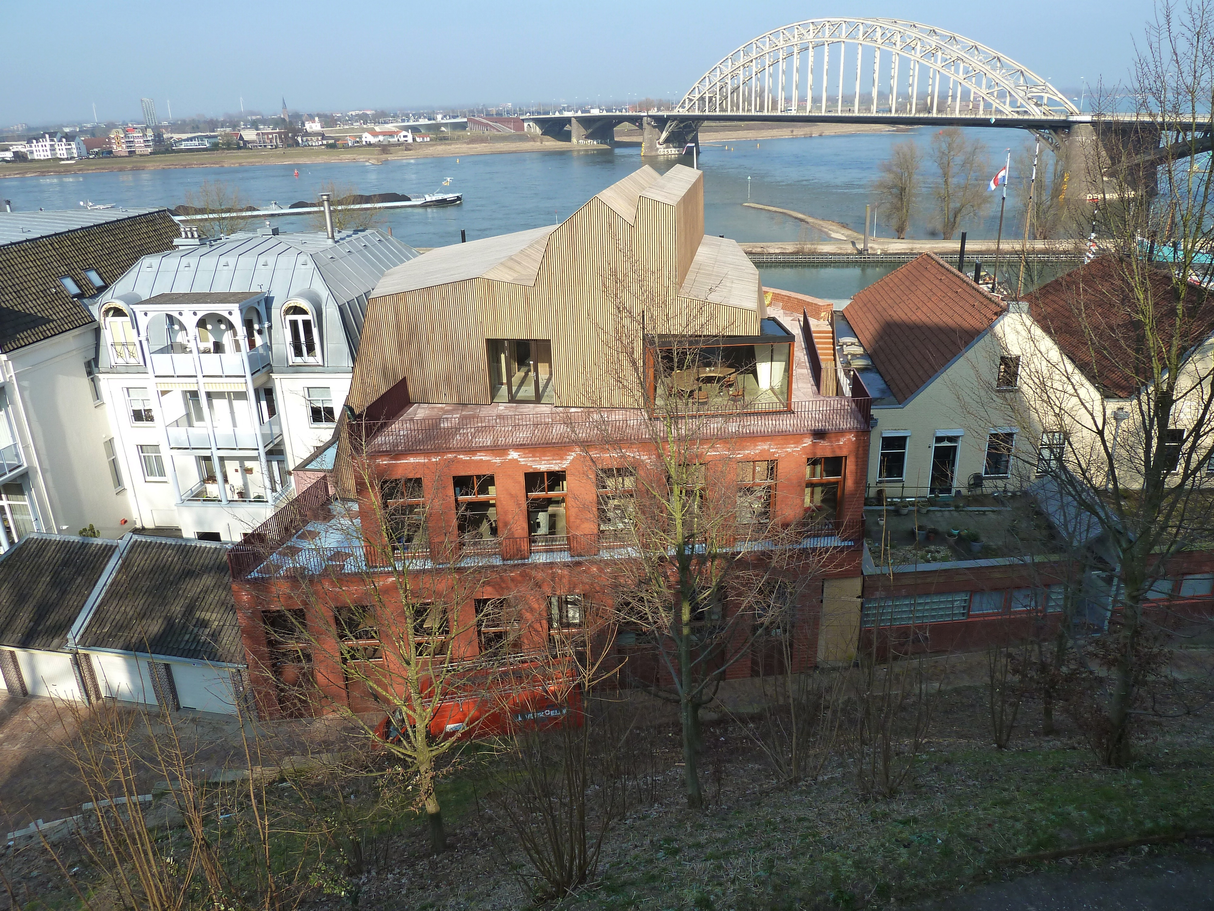 De achterzijde van De Bastei (voormalige Stratemakerstoren) aan de voet van de Valkhofheuvel in Nijmegen. Foto: Rik Jaspers.